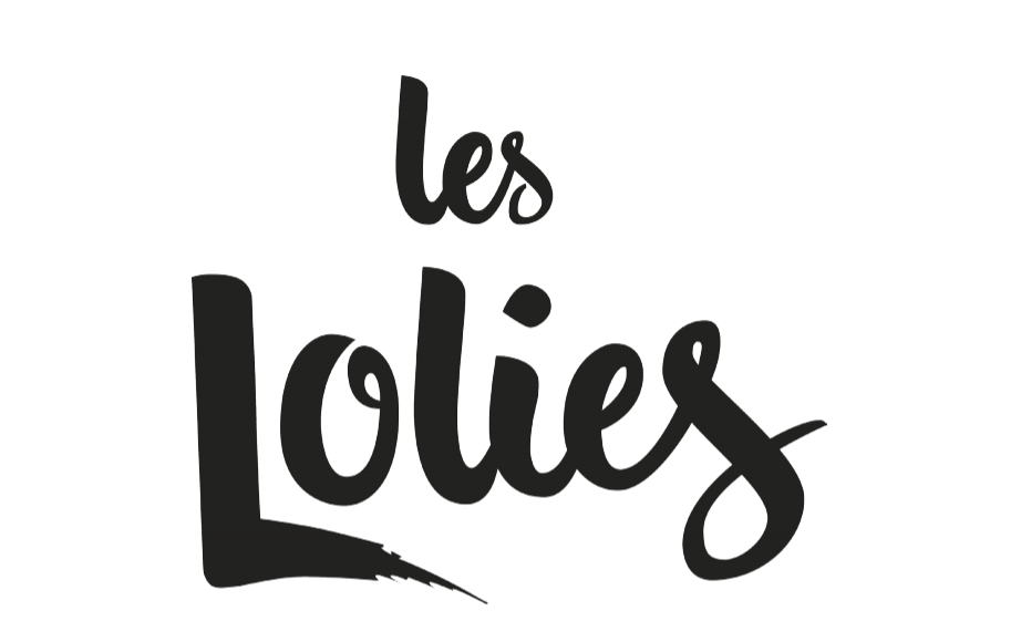 Logo Les Lolies